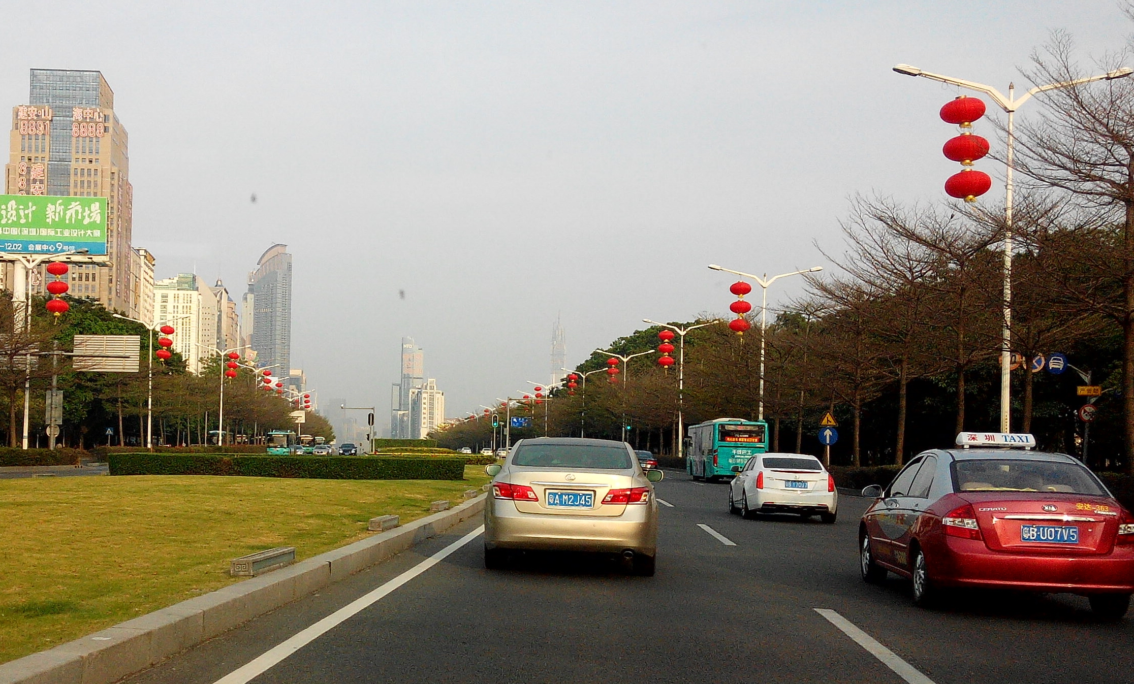 深圳深南大道福田段